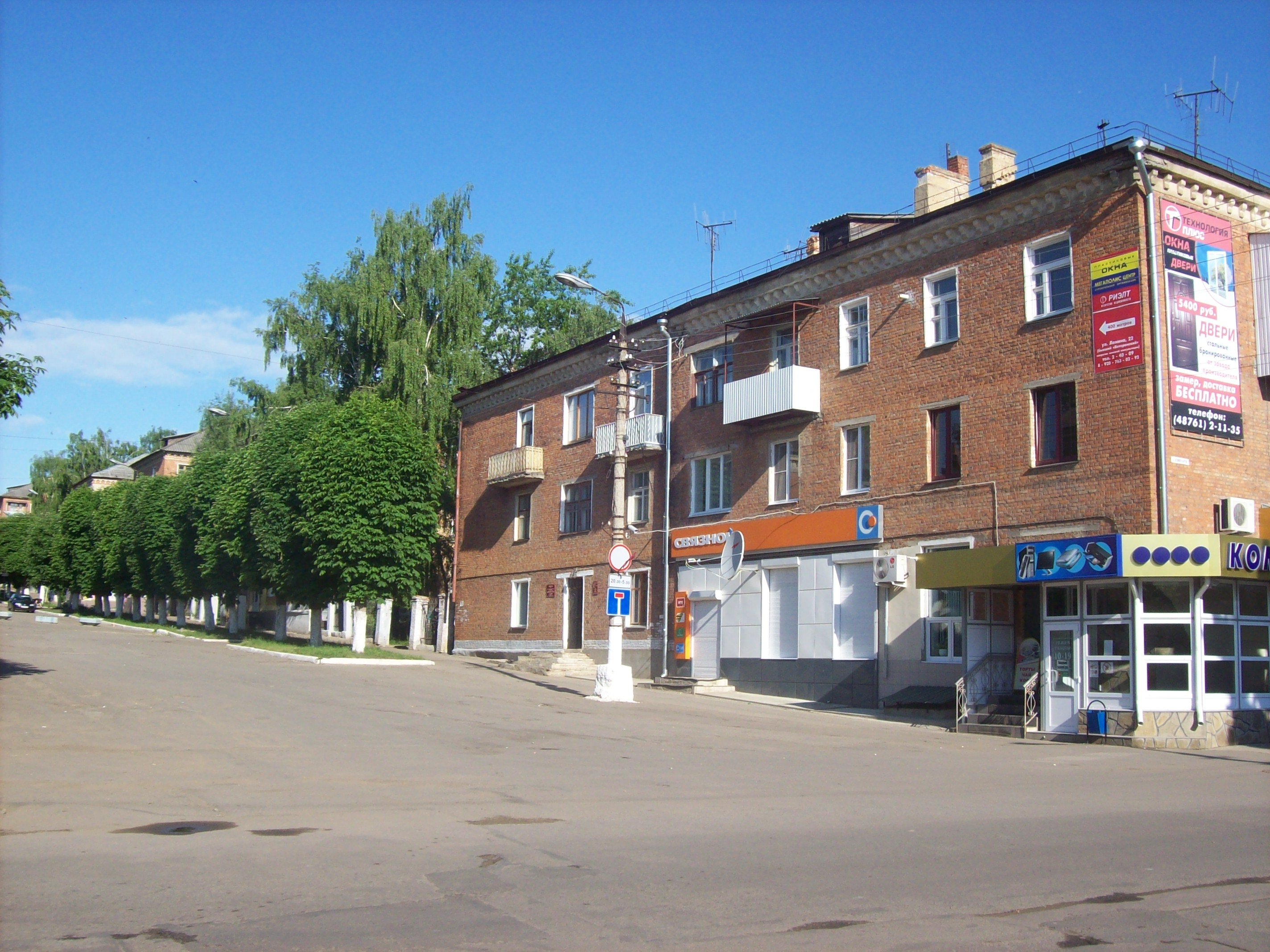 Тульская область. г.Богородицк. Дом в центре города